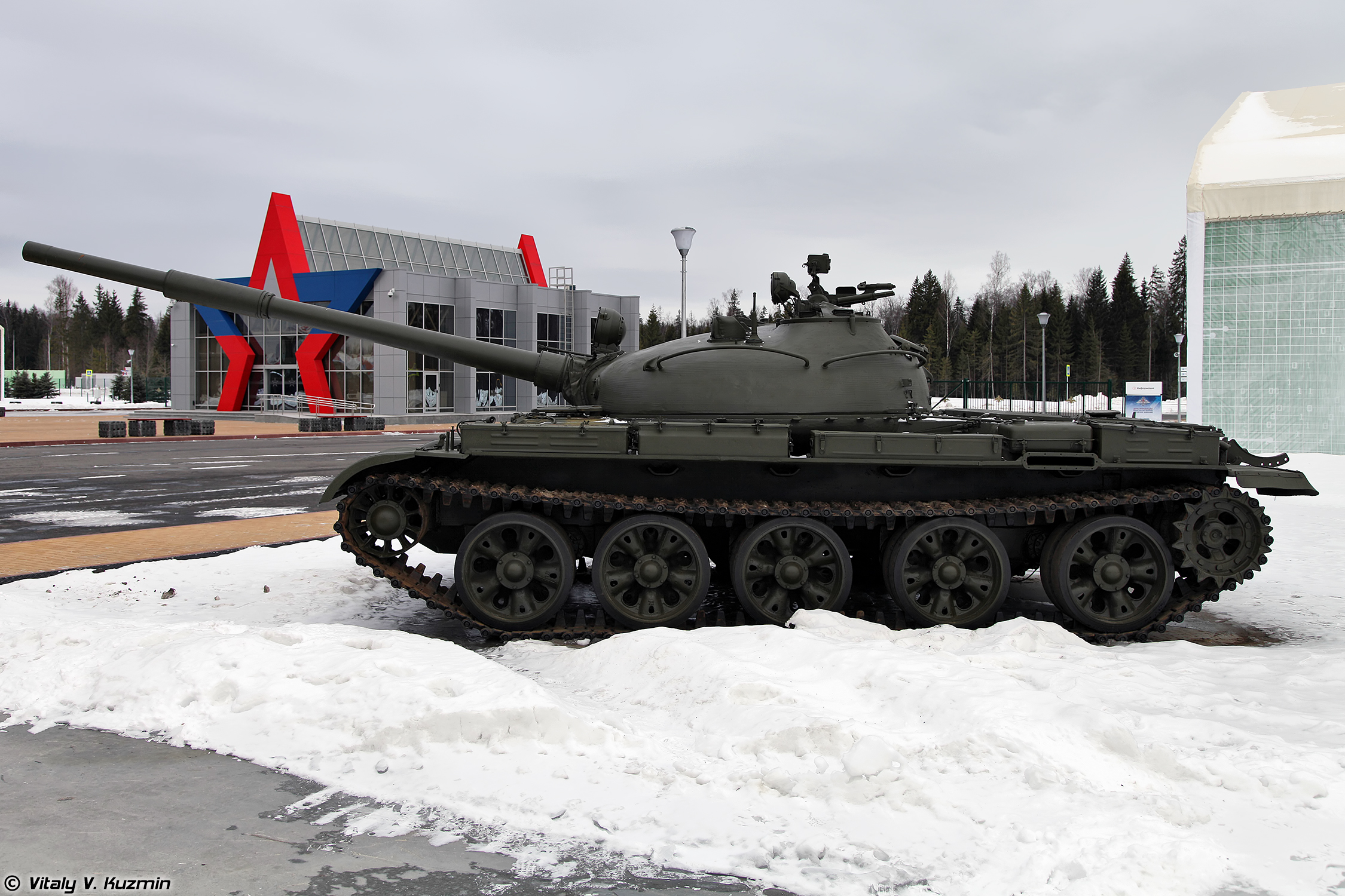 Т-62 образца 1972 года.